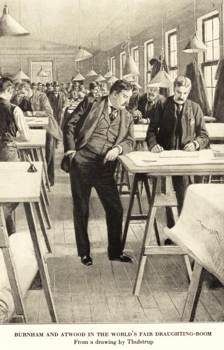 Daniel Burnham and Charles Bowler Atwood im Zeichensaal mit Plänen für die Columbian Exhibition.